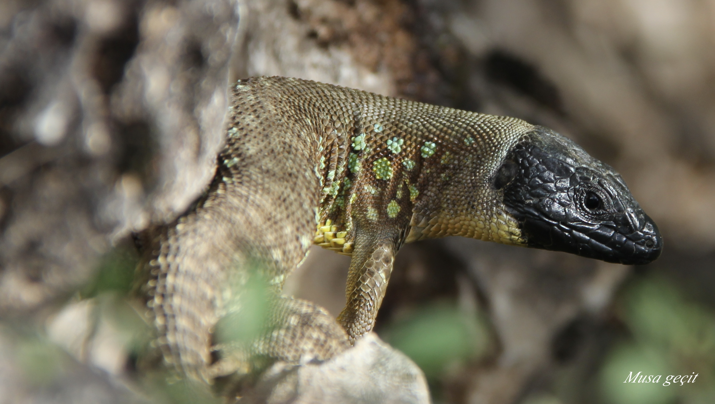 Yer:Mardin/Siirt Kertenkelesi (Timon princeps)